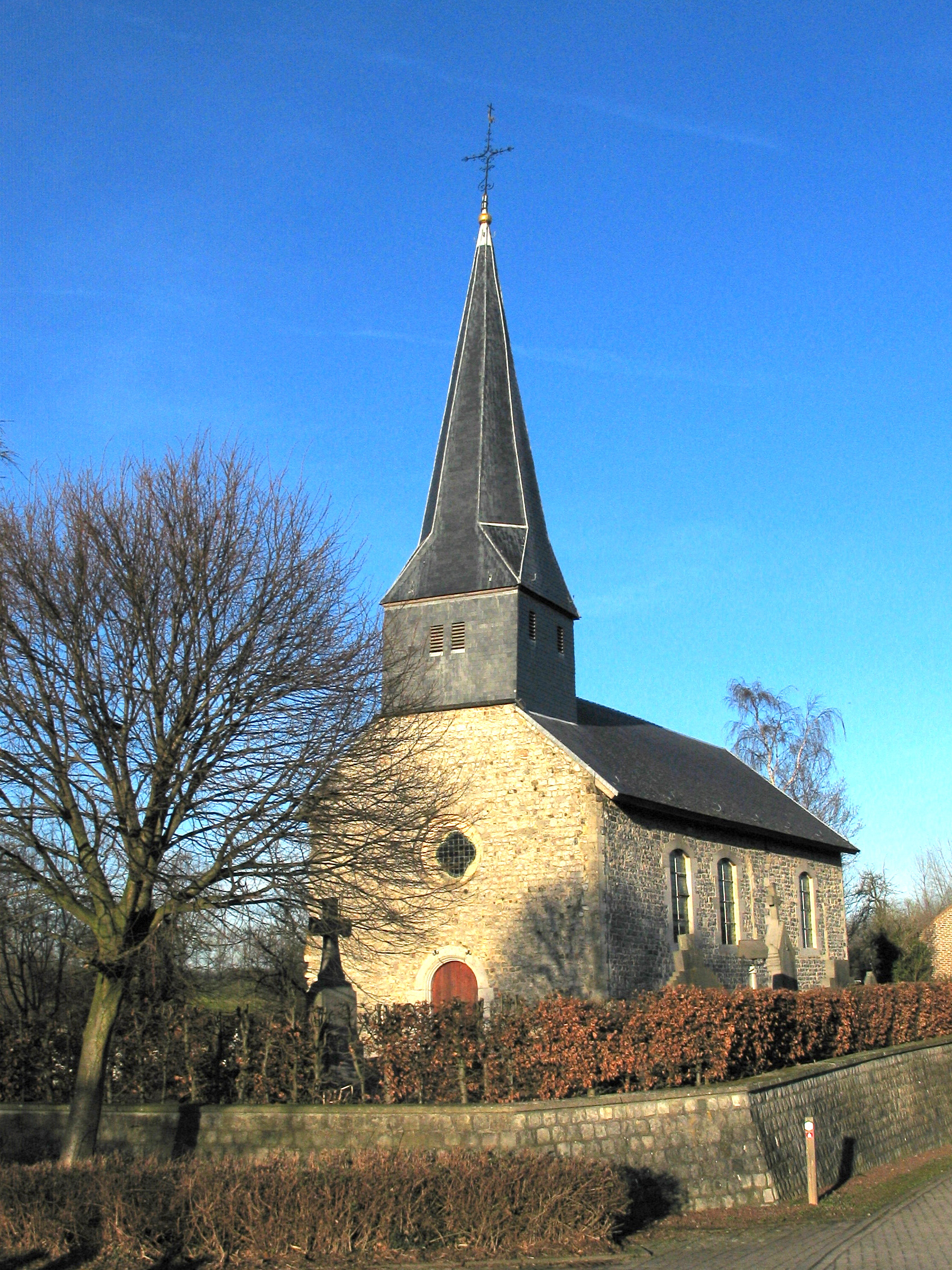 Sint-Pieterskapel in Sint-Pieters-Heurne, Vechmaal, Heers in België